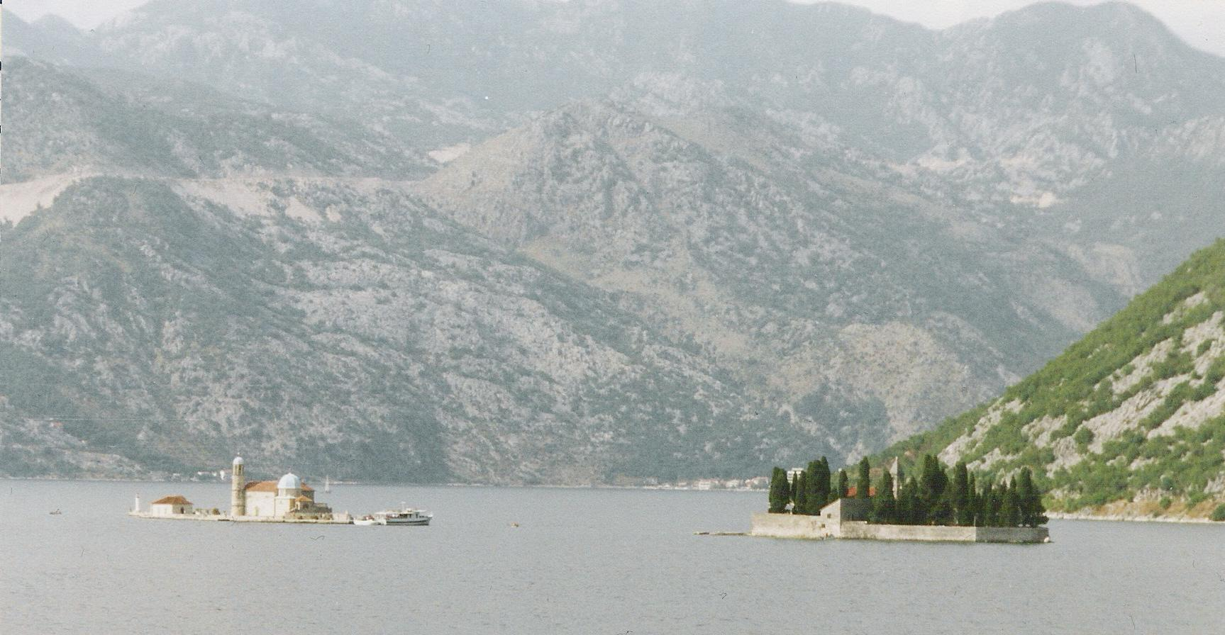 Die Klosterinsel Sv. Djorde in der Bucht von Kotor, August 2004